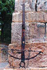 Arbalète ancienne à l'Italienne